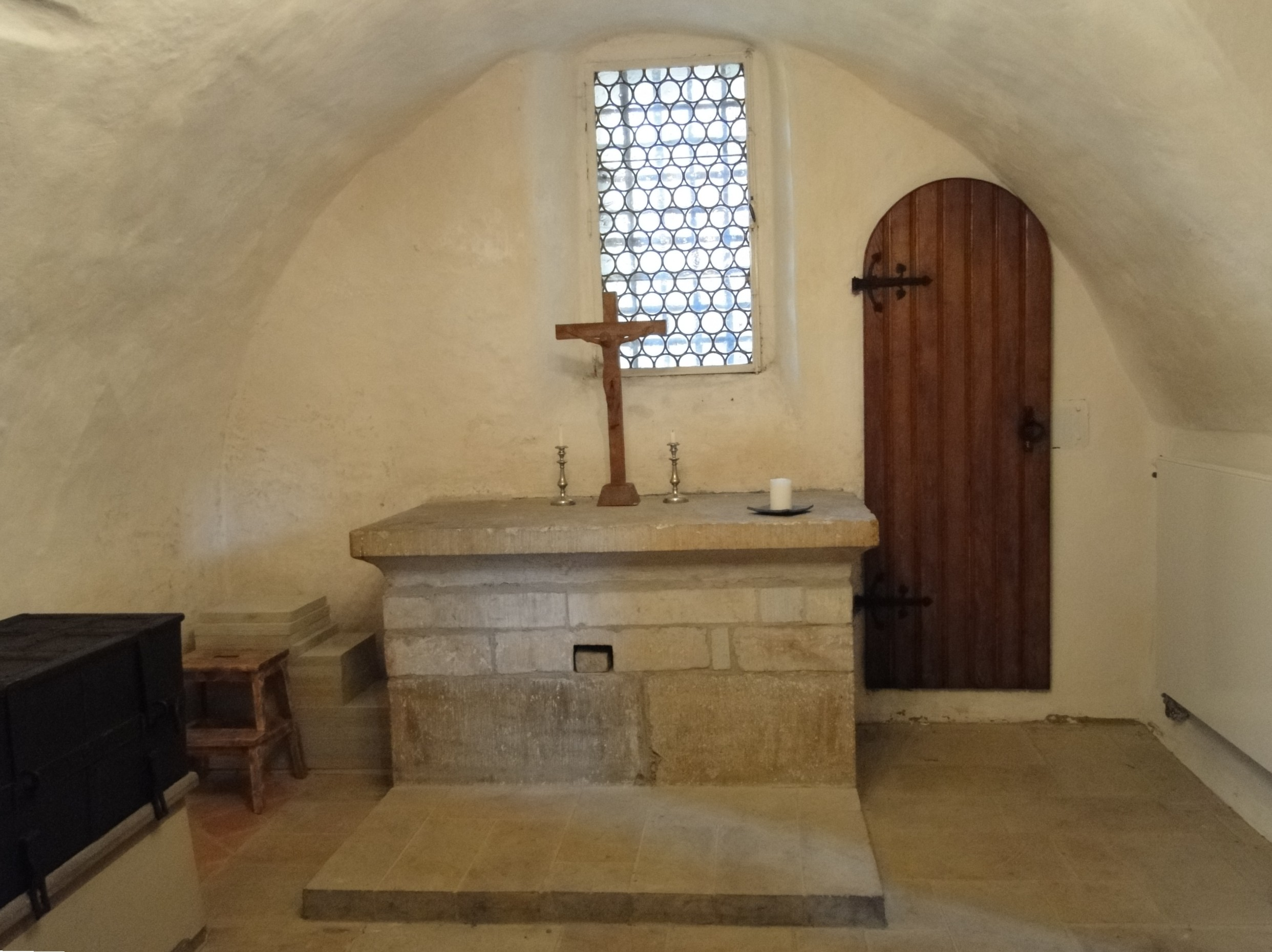 Sakristei Kirche Leubnitz-Neuostra